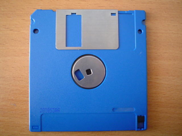 3.5 inch DD (720 KB) floppy disk (back)